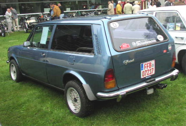 Alfa-Romeo Alfasud Giardinetta (Estate)